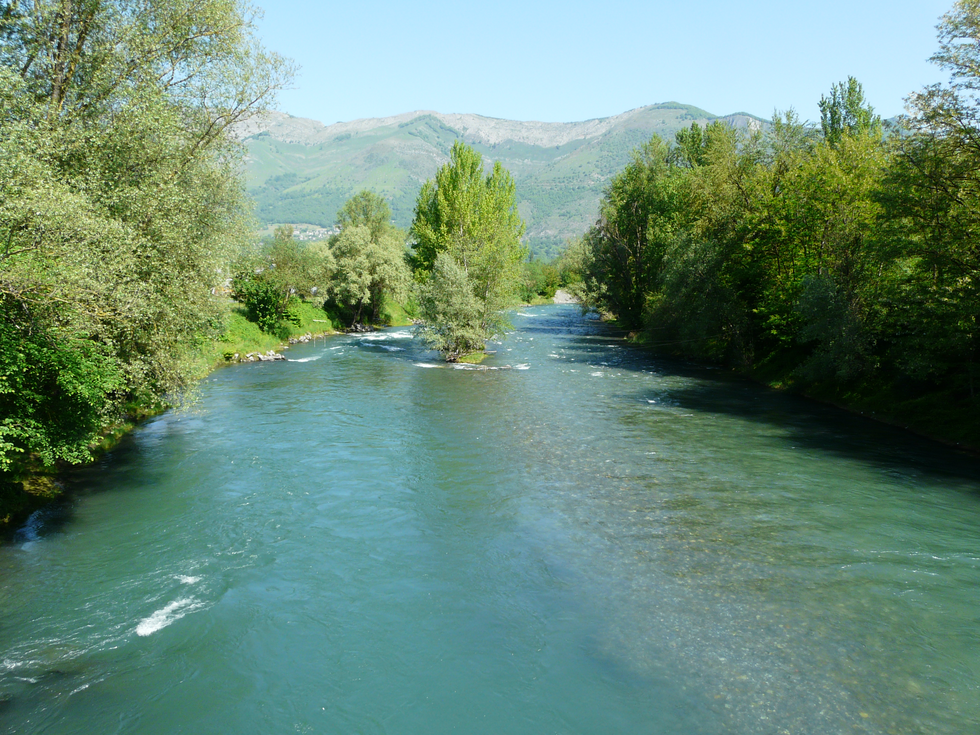 En aval du pont de la route départementale 100, le gave de Pau marque la limite entre Argelès-Gazost (à gauche) et Ayros-Arbouix (à droite),Hautes-Pyrénées, France.